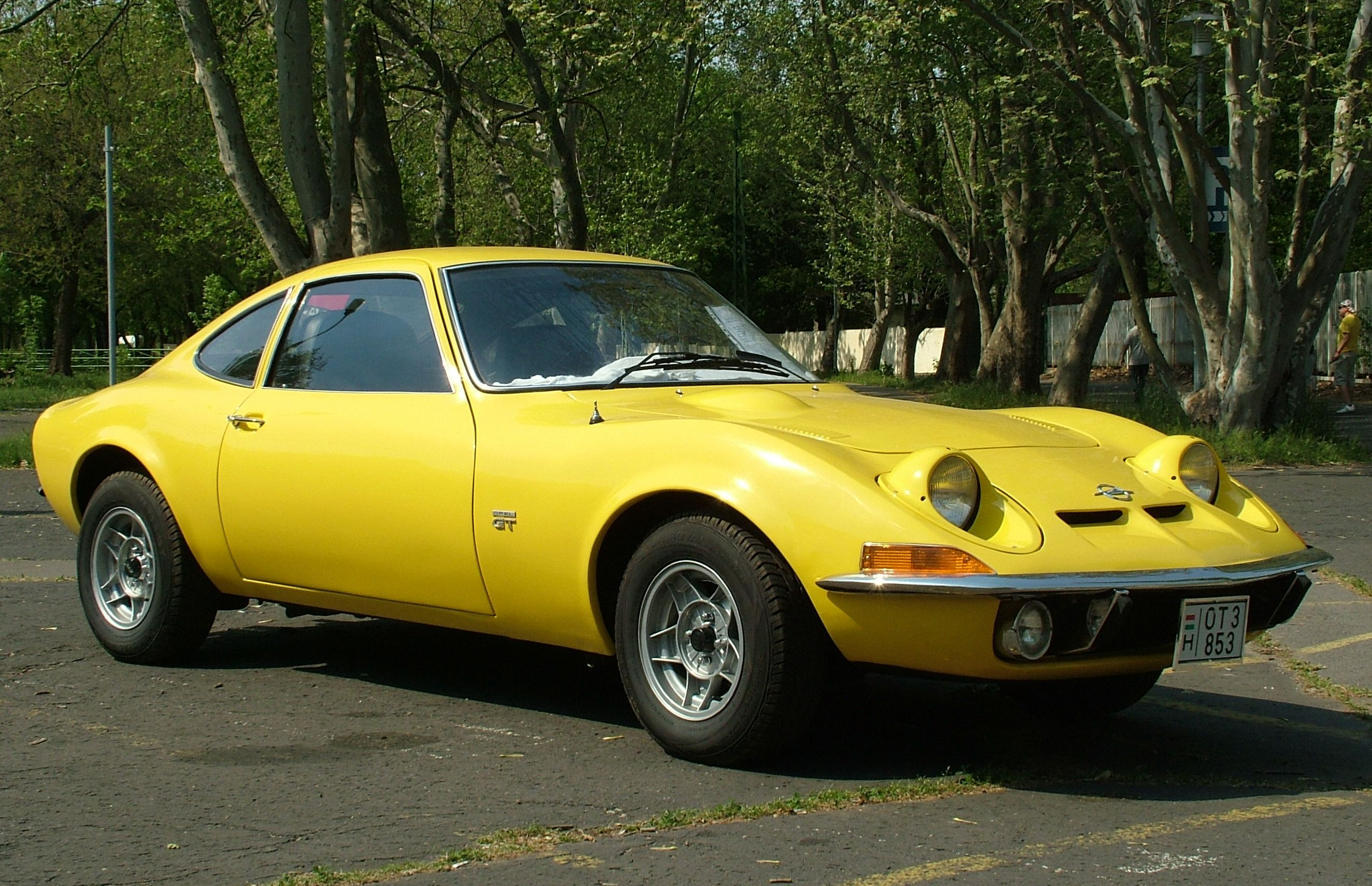 A visitor's Opel GT A-L, 1971